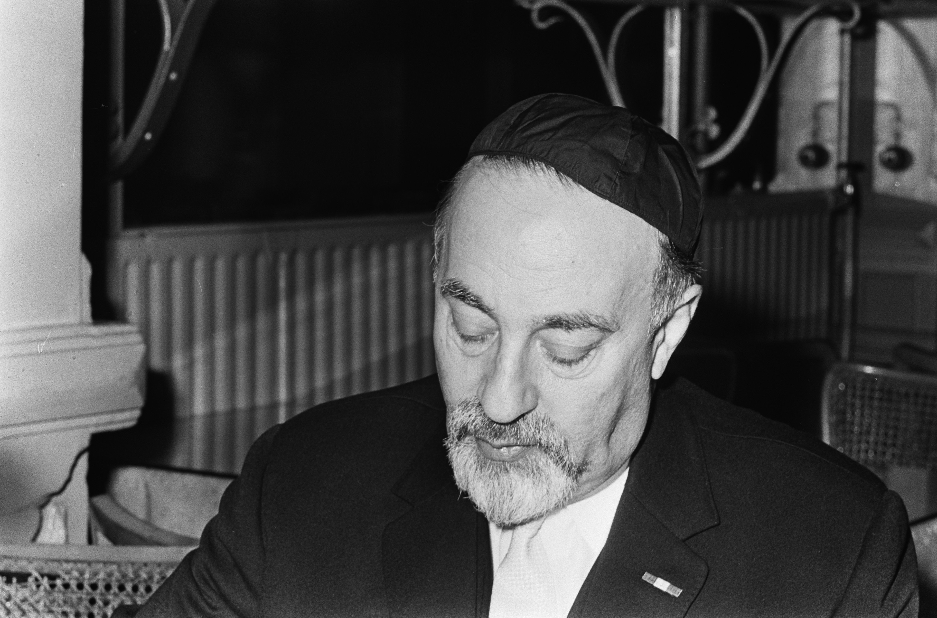 Collectie / Archief : Fotocollectie Anefo Reportage / Serie : [ onbekend ] Beschrijving : Opperrabijn E. Berlinger (kop) Datum : 4 maart 1965 Trefwoorden : KOPPEN Persoonsnaam : e berglinger Fotograaf : Koch, Eric / Anefo Auteursrechthebbende : Nationaal Archief Materiaalsoort : Negatief (zwart/wit) Nummer archiefinventaris : bekijk toegang 2.24.01.05 Bestanddeelnummer : 917-5016